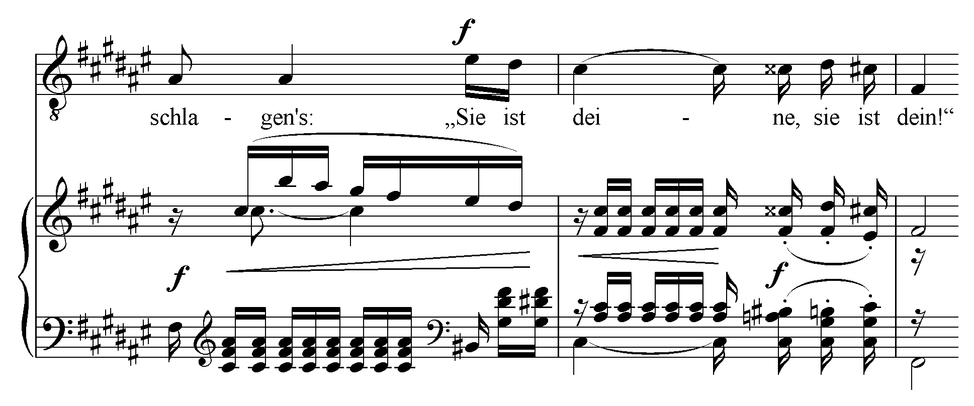 Excerpt from Robert Schumann's song "Frühlingsnacht" from Liederkreis, Op. 39, No. 12 (1840), bars 24–26